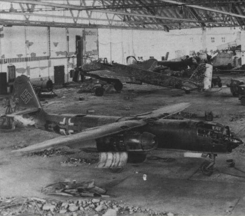 An Arado Ar 234B and a Junkers Ju 88G at Manching, after the airfield was occupied by U.S. forces.